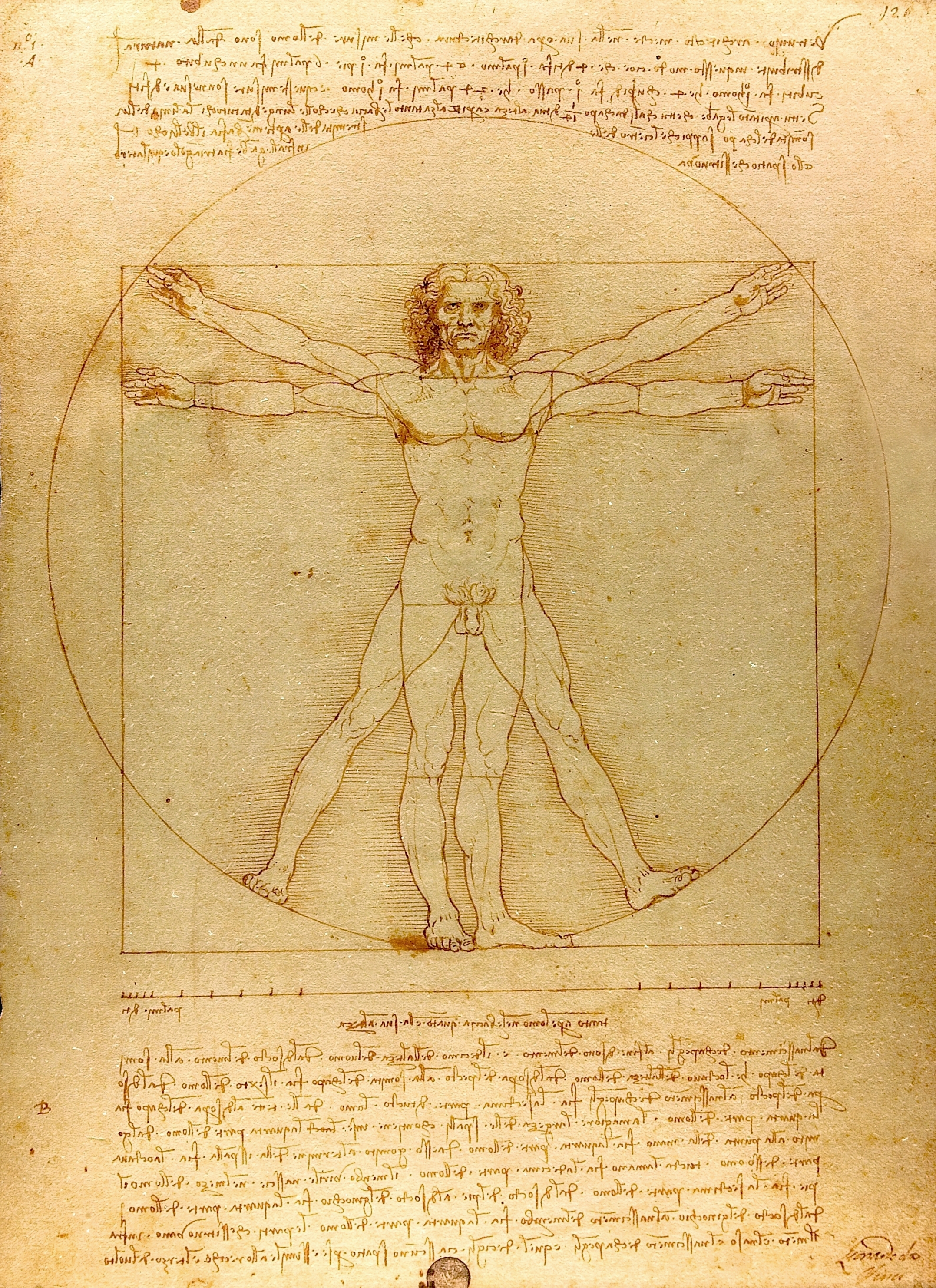 Vitruvian Man